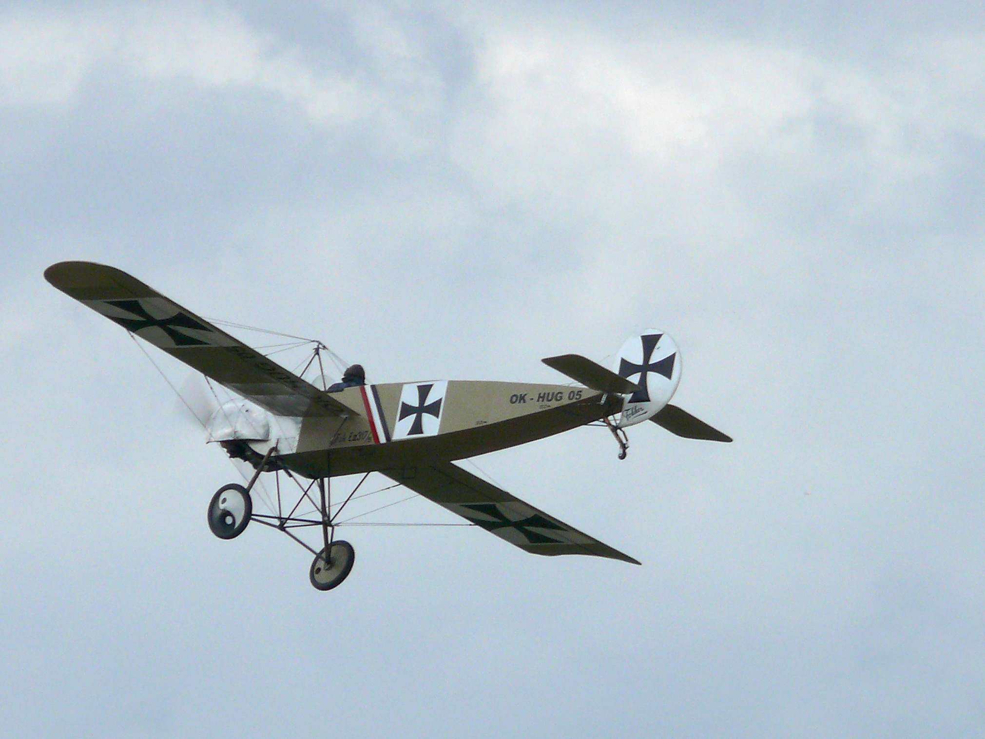 28.06.2008 - Medzinárodný letecký deň pri príležitosti 55. výročia založenia Žilinskej Univerzity a 90. výročia vzniku československého letectva.